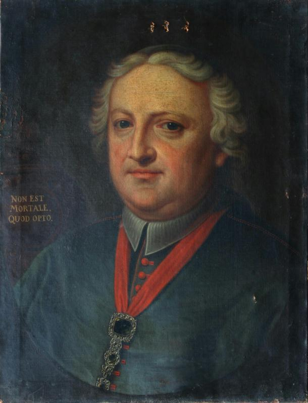 Erdődy Gábor egri püspök.